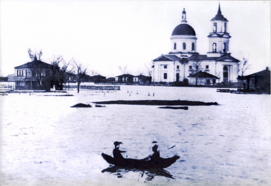 Церковь Покрова Пресвятой Богородицы в станице Елизаветинской (уничтожена в 1937), Азовский район Ростовской области.